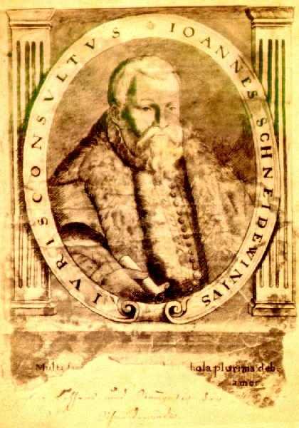 Epitaph in der Schloßkirche zu Wittenberg des Ioannes Schneidewinius (1519-1568), auch Johannes Schneidewind oder Johann Schneidewein genannt.